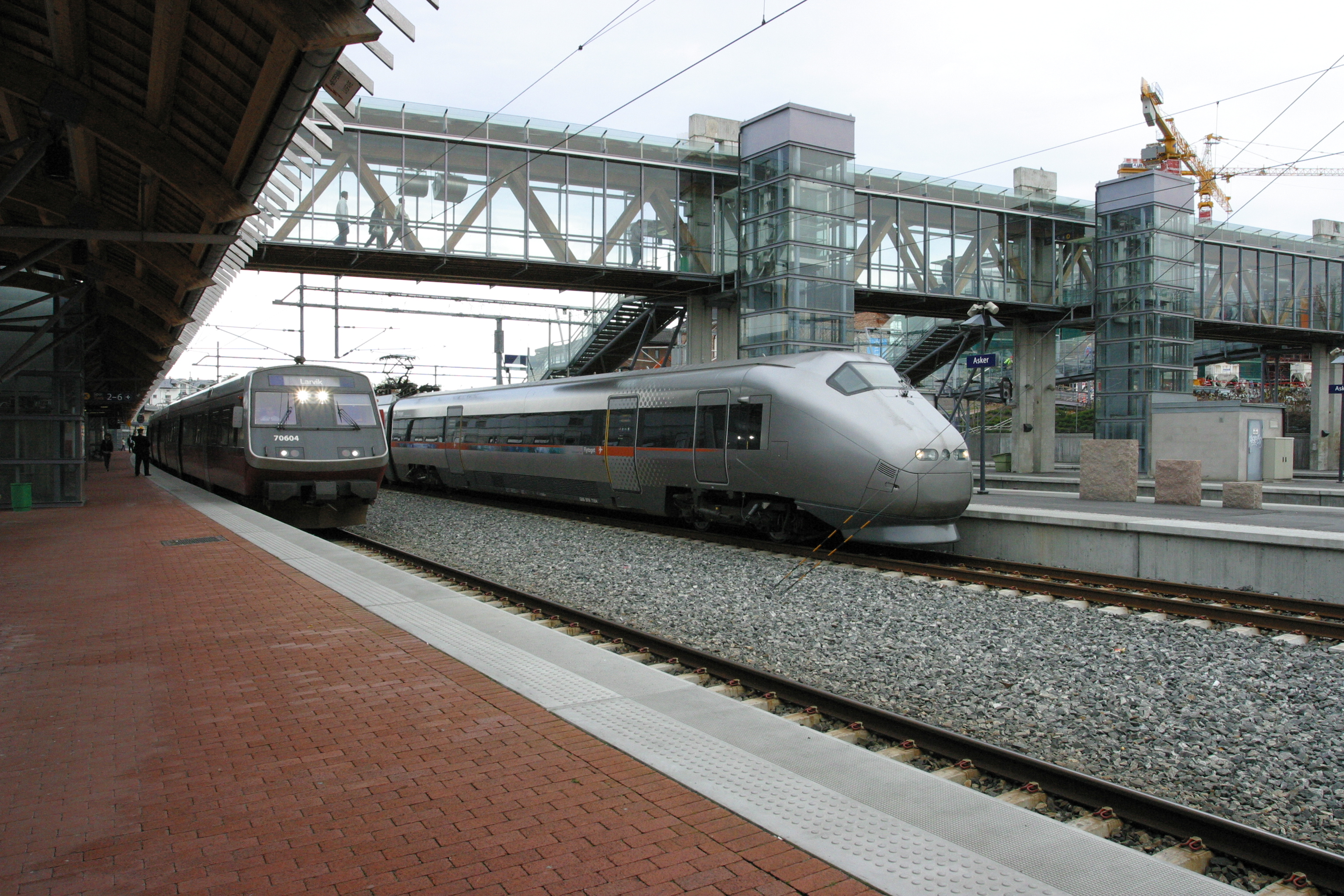 IC-tog til Larvik og Flytoget på Asker stasjon